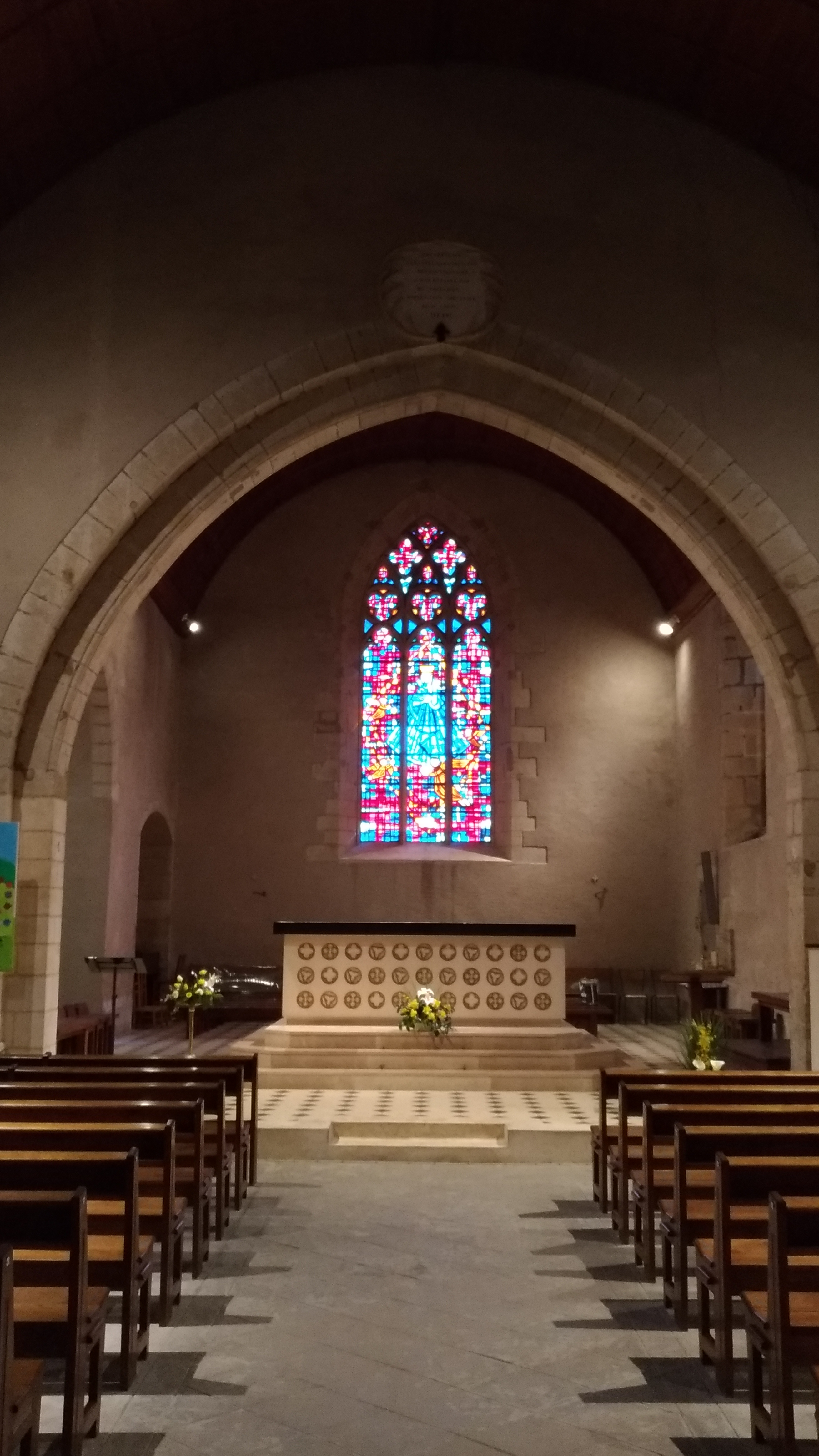 Vue de la nef principale et du choeur